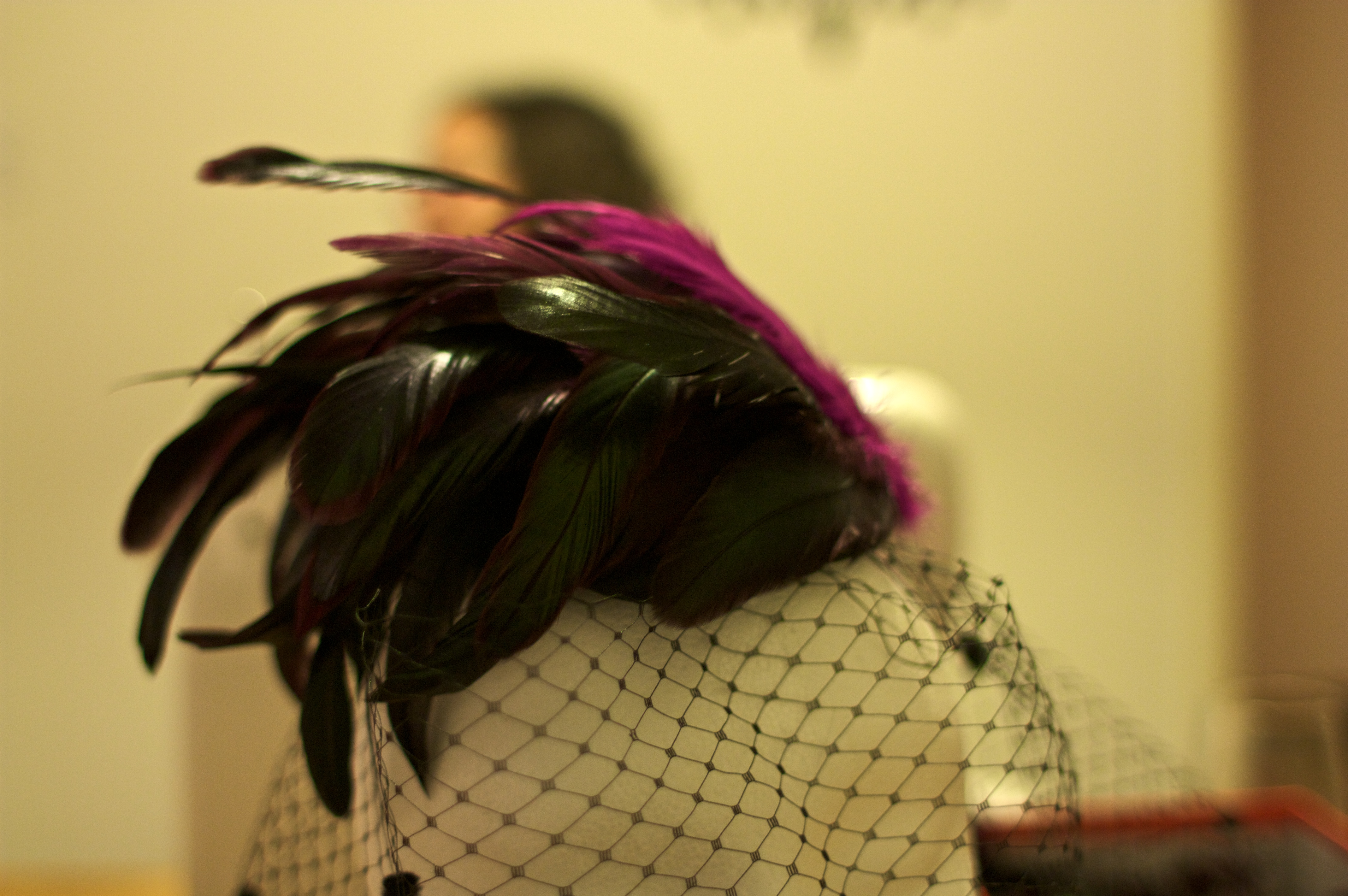 Carla made a cocktail hat...